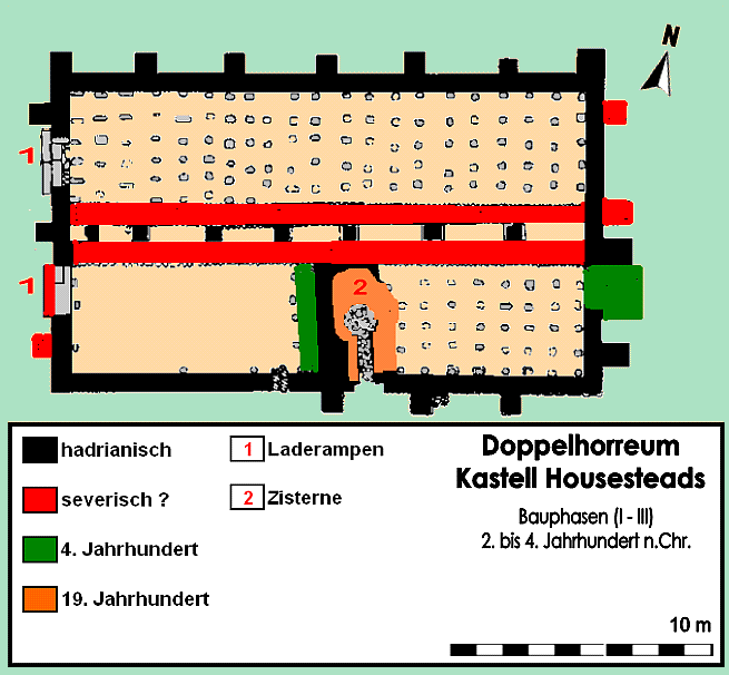 Befundskizze des Doppelhorreums im Kastell Housesteads/Vercovicium, Hadrianswall (GB), Bauphasen I - III, 2. bis 4. Jahrhundert n.Chr.